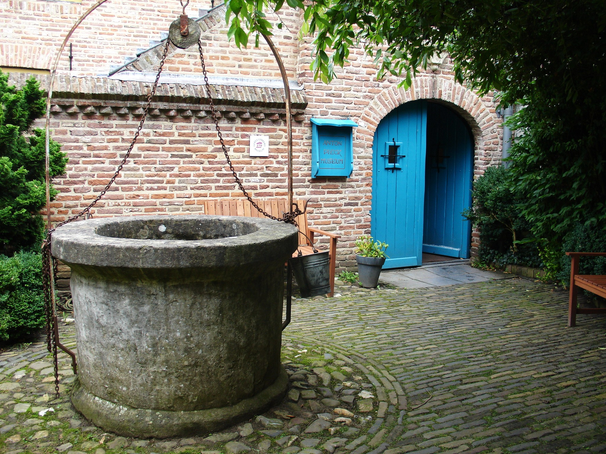 Binnenplaats van het Anton Pieckmuseum, Achterstraat 46-48, Hattem.